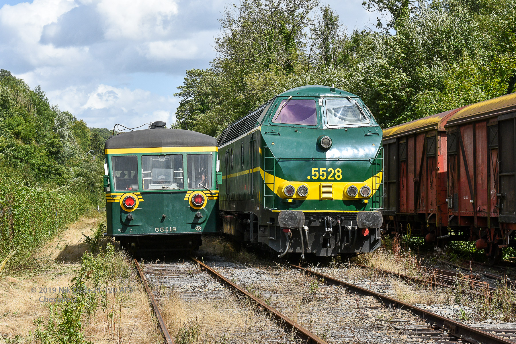 2019-Autorail 554.18 du PFT-TSP